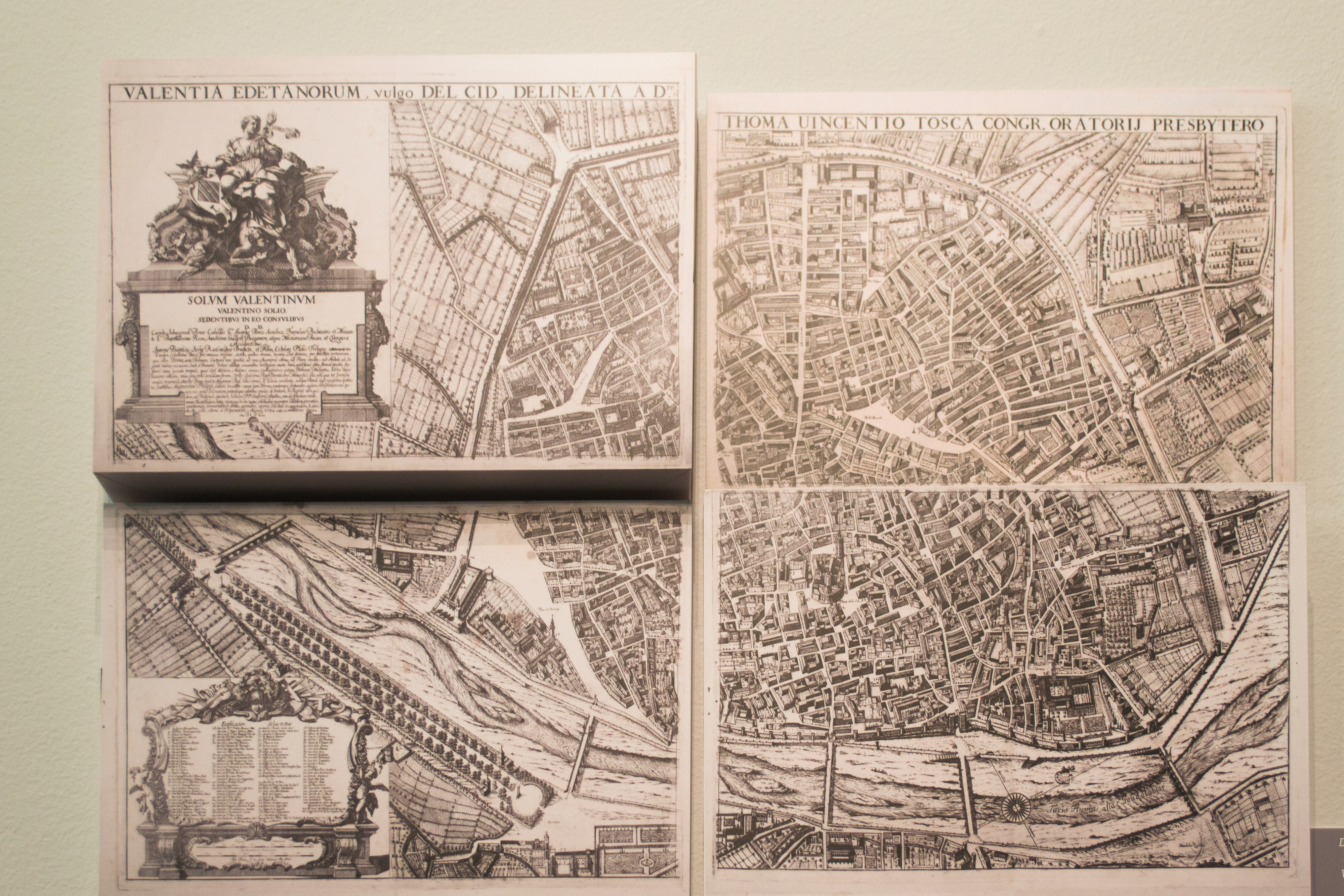 Mapa de Valencia según Tomás Vicente Tosca dividido en cuatro fragmentos (c. 1738). Expuesto en el MuVIM